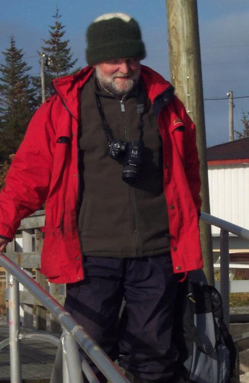 Bjørn Erik Stemland, rektor ved knut hamsund VGS. Tatt av Bruker:ThorRune sent i 2004, under besøk på Grøtøya ved besøk fra utvekslingselever i Zambia.